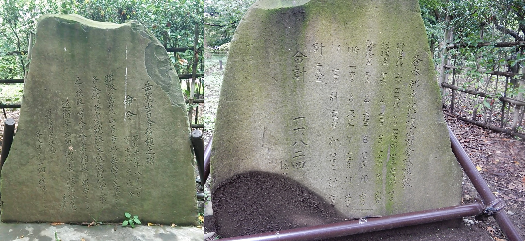 昭和１４年８月、富士山麓で演習した同連隊が営庭美化のため各中隊の競争で山百合を採取した記録。中隊ごとの採取数が記録されているため、当時の連隊の編制がわかる。